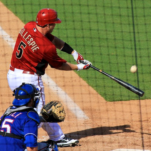 Cole Gillespie